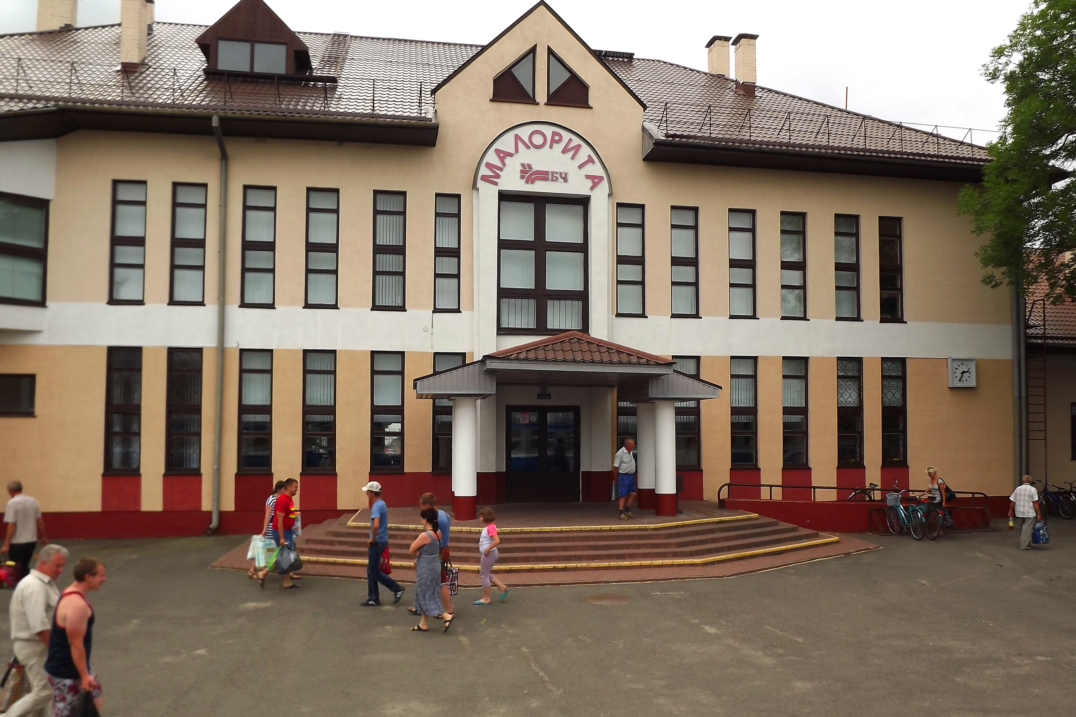 Вакзал чыгуначнай станцыі Маларыта (Брэсцкая вобласць, Беларусь)